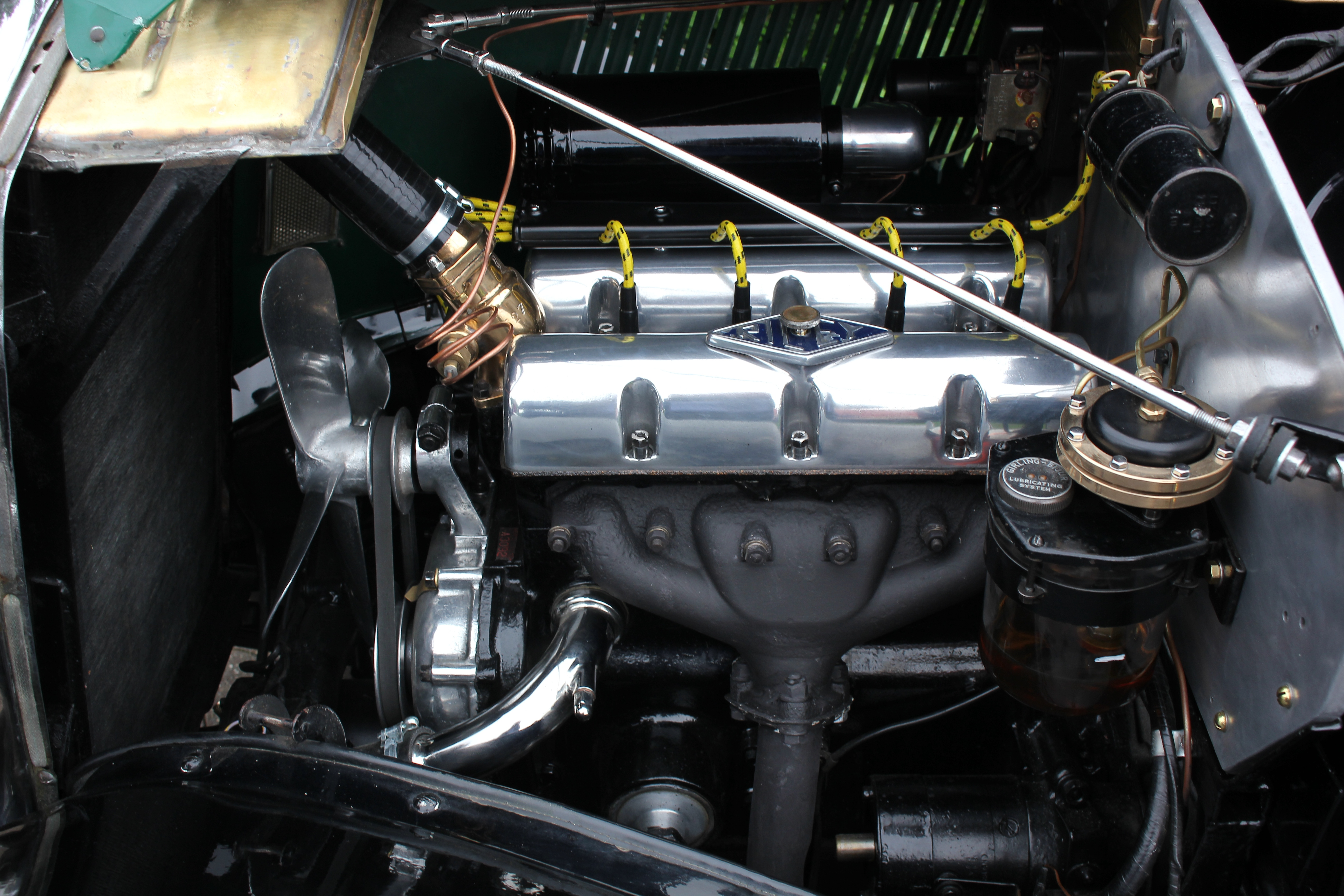 Riley Adelphi, Baujahr 1935, 4-Zylinder-Reihenmotor